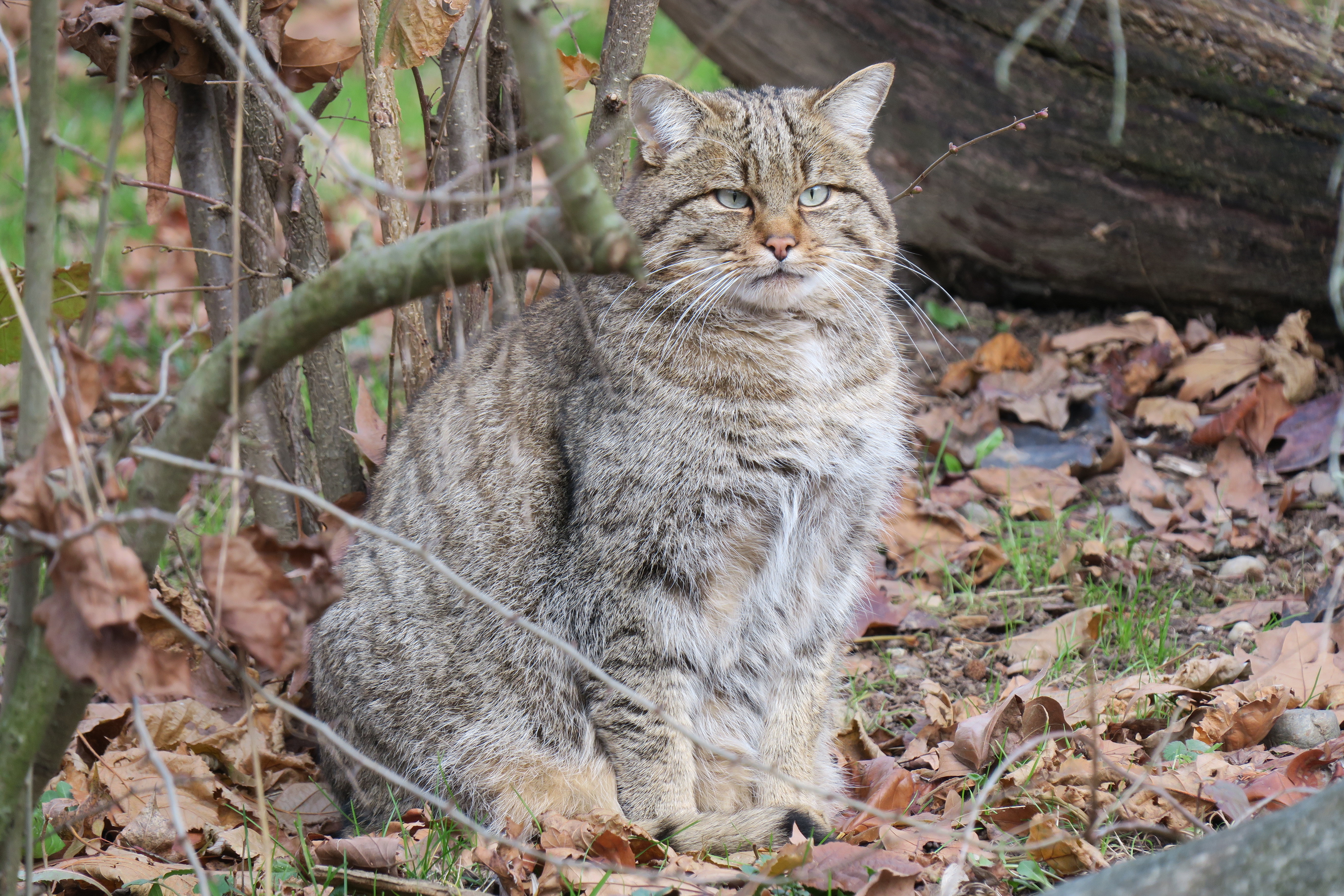 Wildkatze (Felis silvestris silvestris) fotografiert im Tierpark Lange Erlen in Basel.